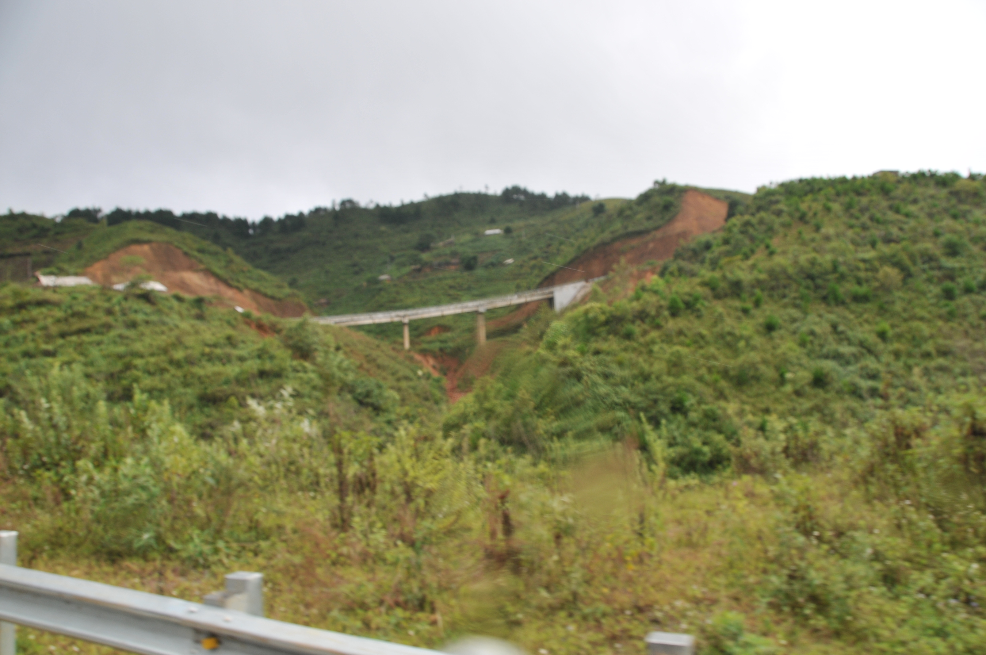 Đèo Pha Đin